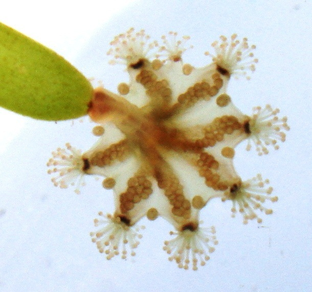 Haliclystus_octoradiatus_-_Becherqualle_an_Seegrass